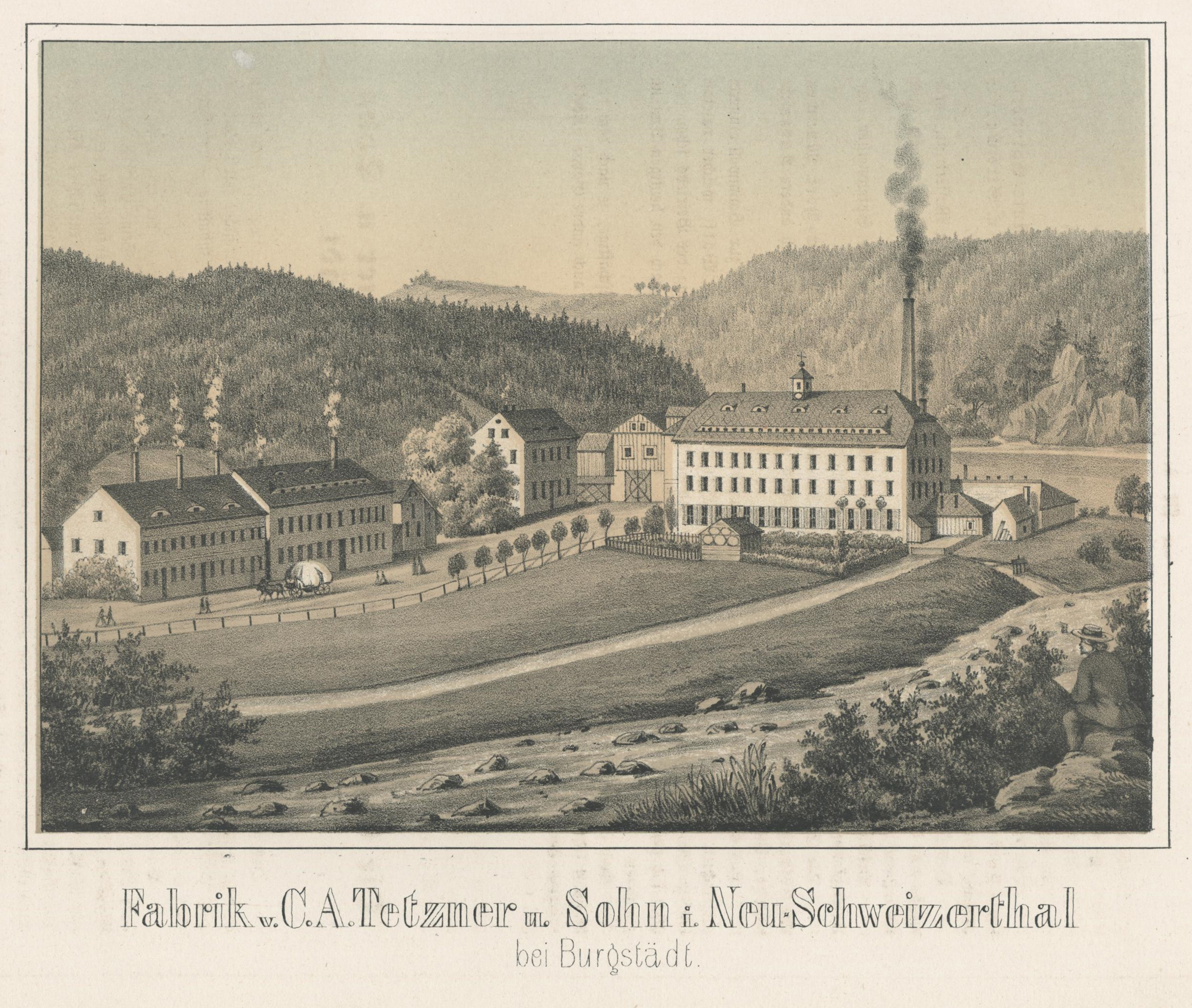 Fabrik von C. A. Tetzner und Sohn in Neu-Schweizerthal bei Burgstädt aus: Album der Sächsischen Industrie Zweiter Band